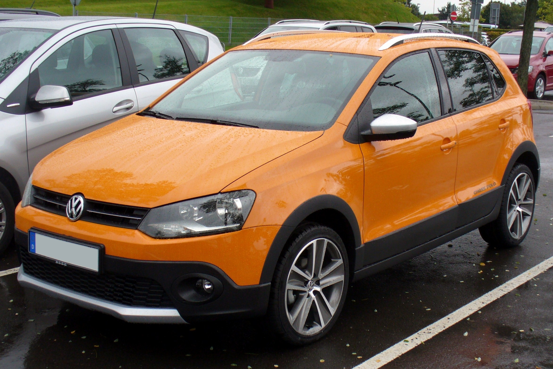 VW CrossPolo